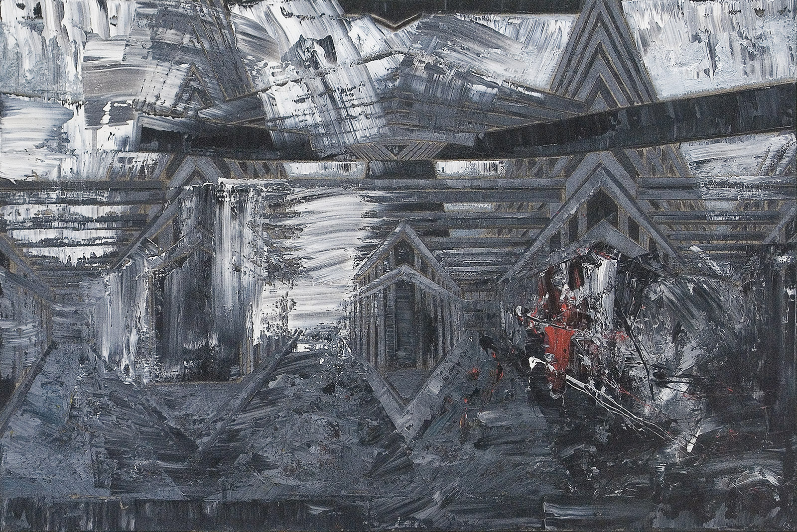 Jiří Sozanský, Skelet (olej) 200 x 300 cm, 2010